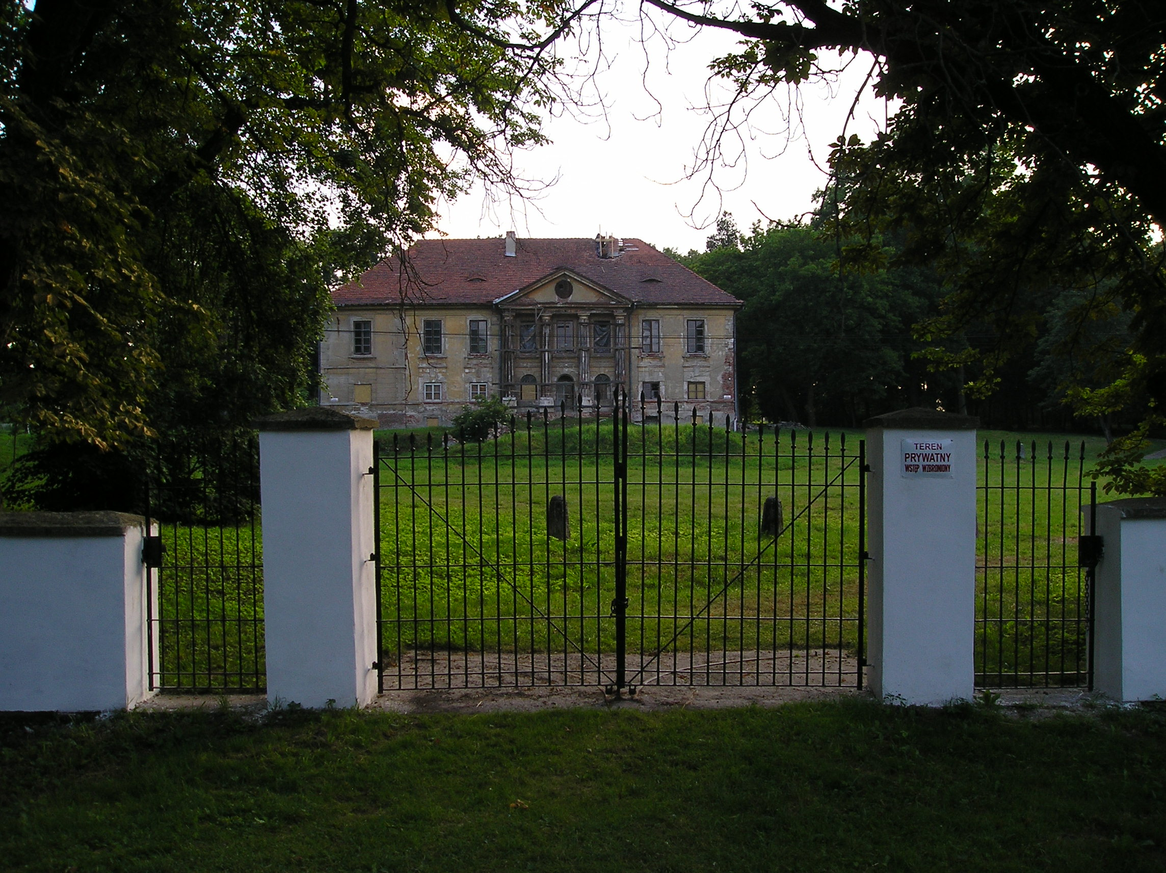 Pławowice - Pałac, park.